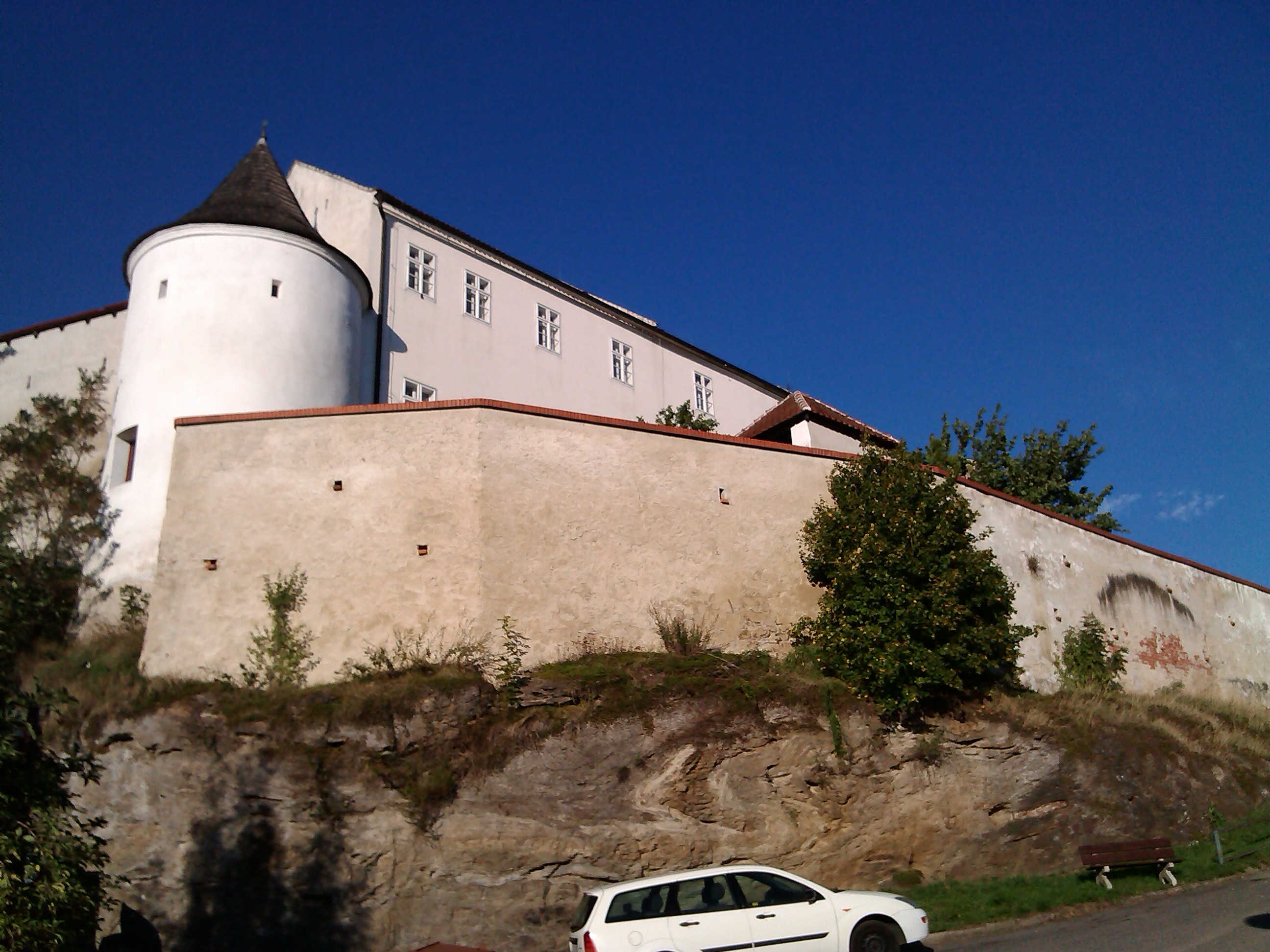 Městské opevnění (Moravské Budějovice), Pivovarská, Kosmákova, Moravské Budějovice